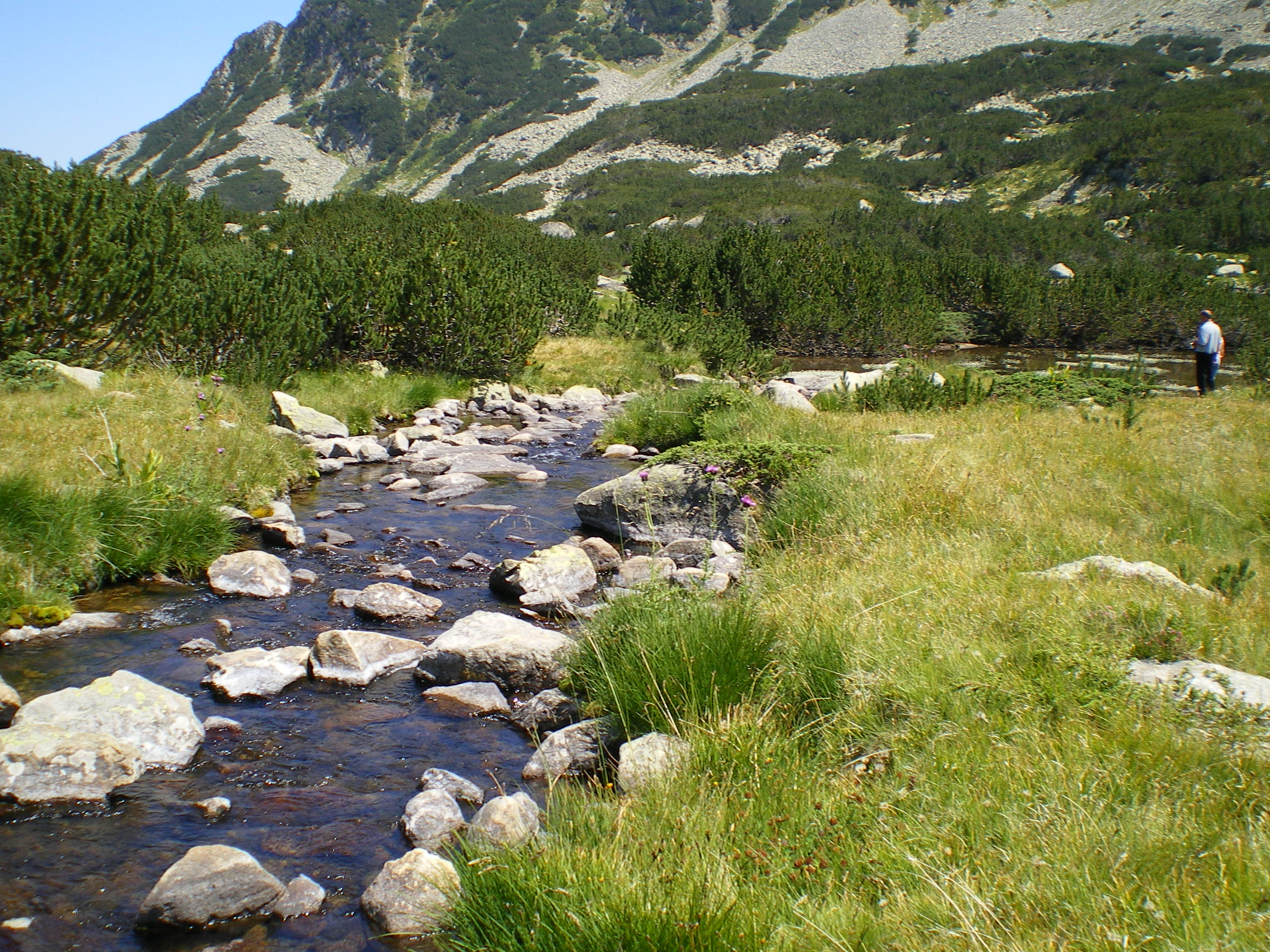 Retije river, Pirin, Bulgaria. Shrubs are Pinus mugo.